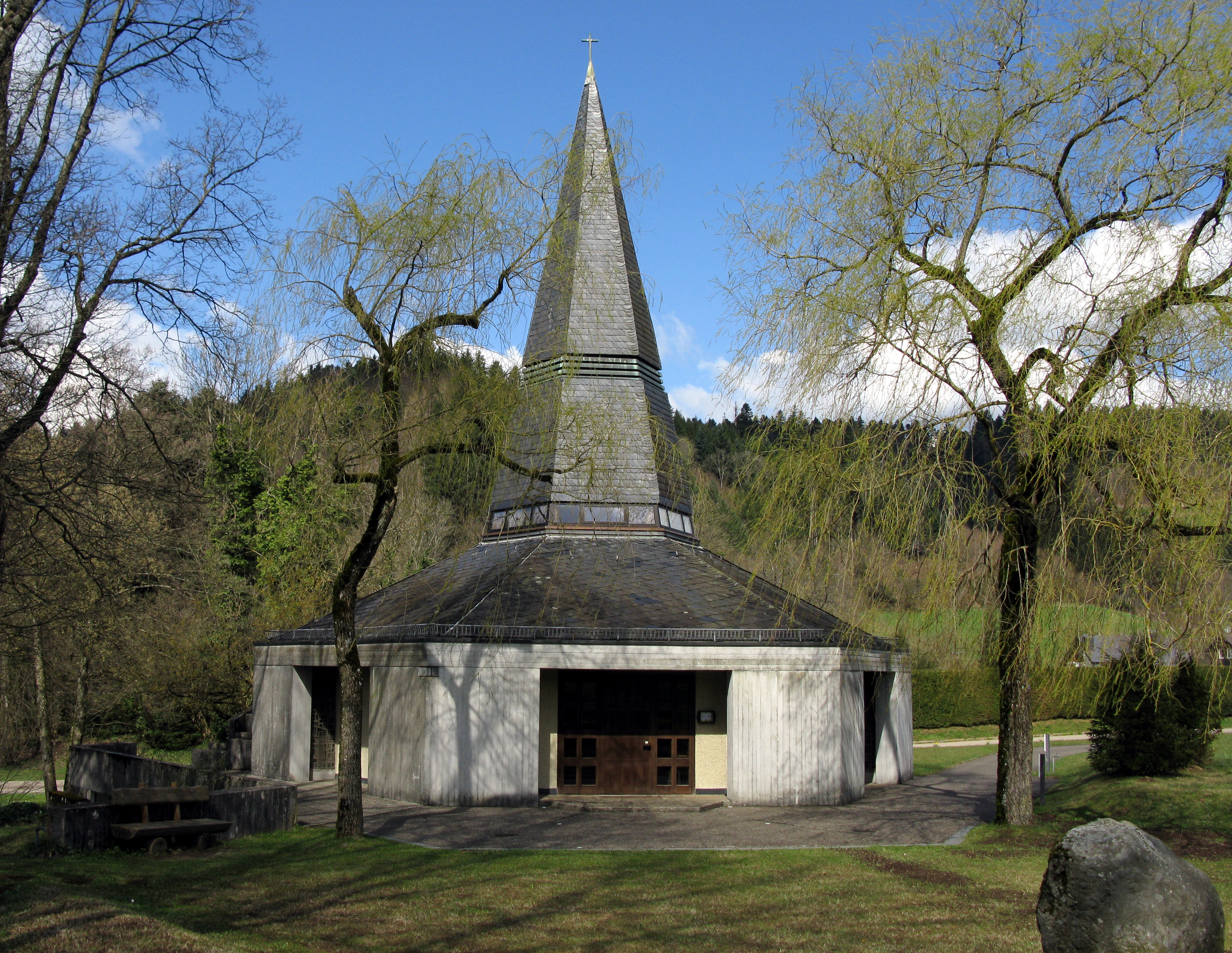 Vaterunser-Kapelle in Buchenbach-Wiesneck